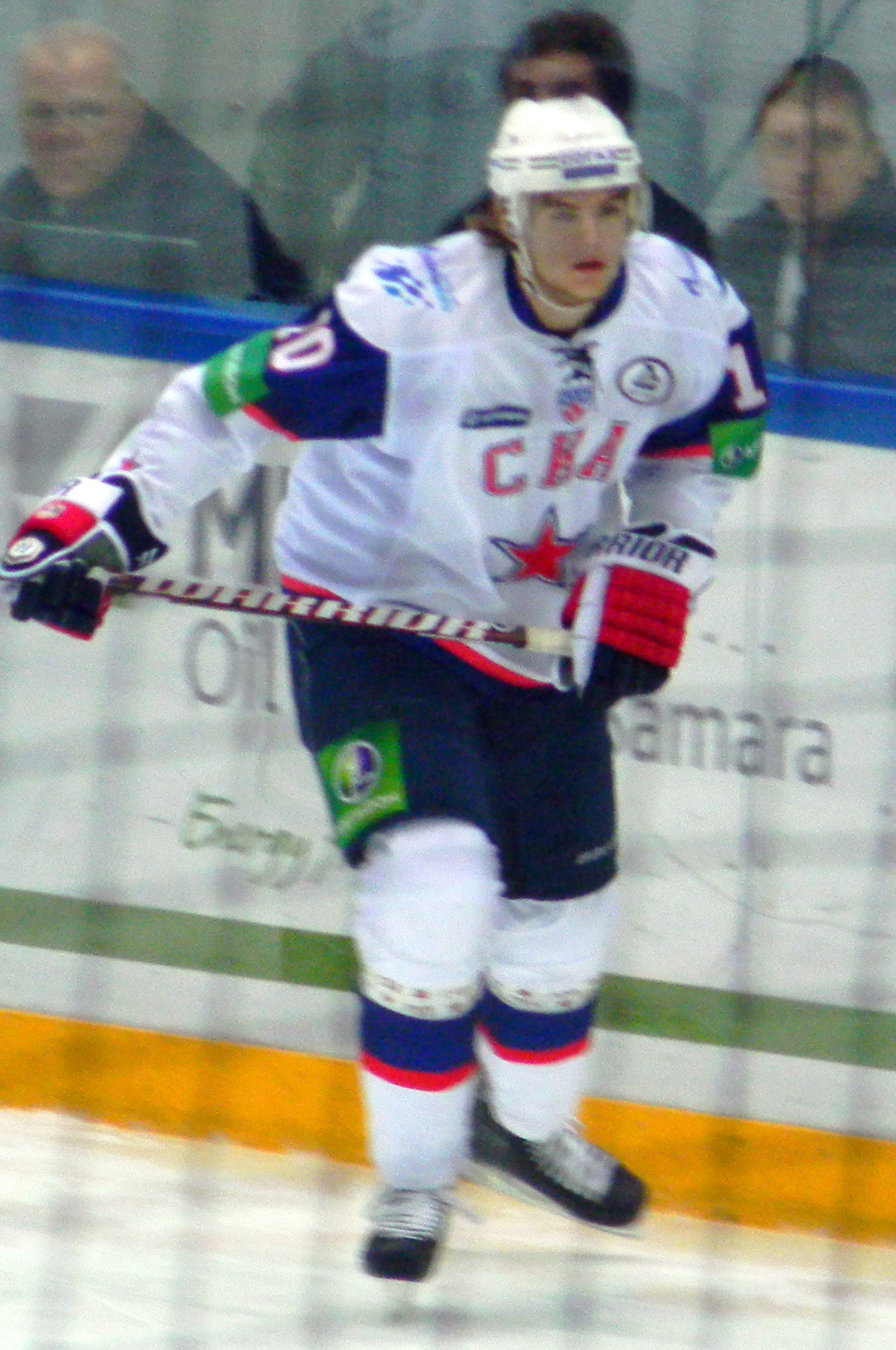 Виктор Тихонов, нападающий питерского СКА